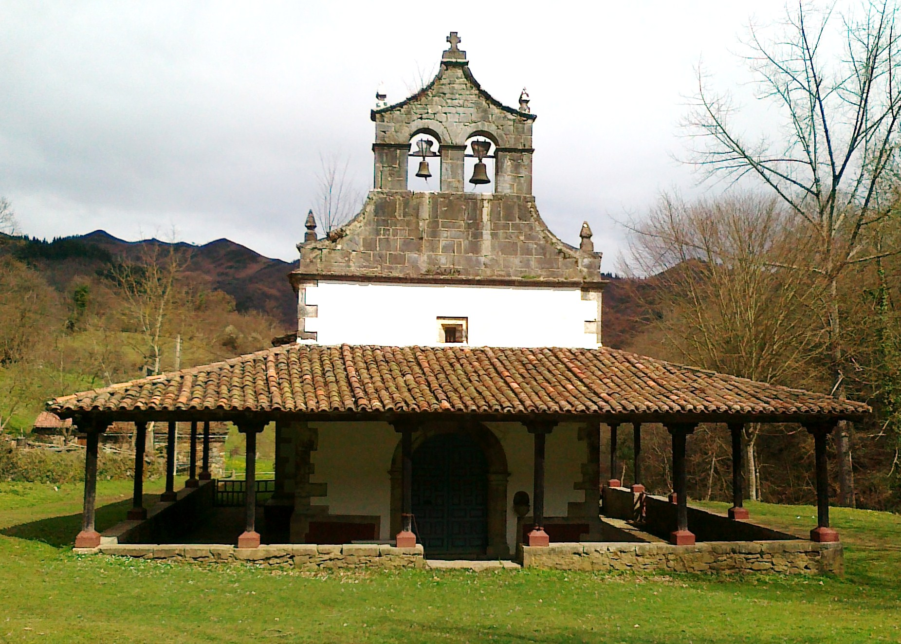 Santuario Miravalles-frontal sur